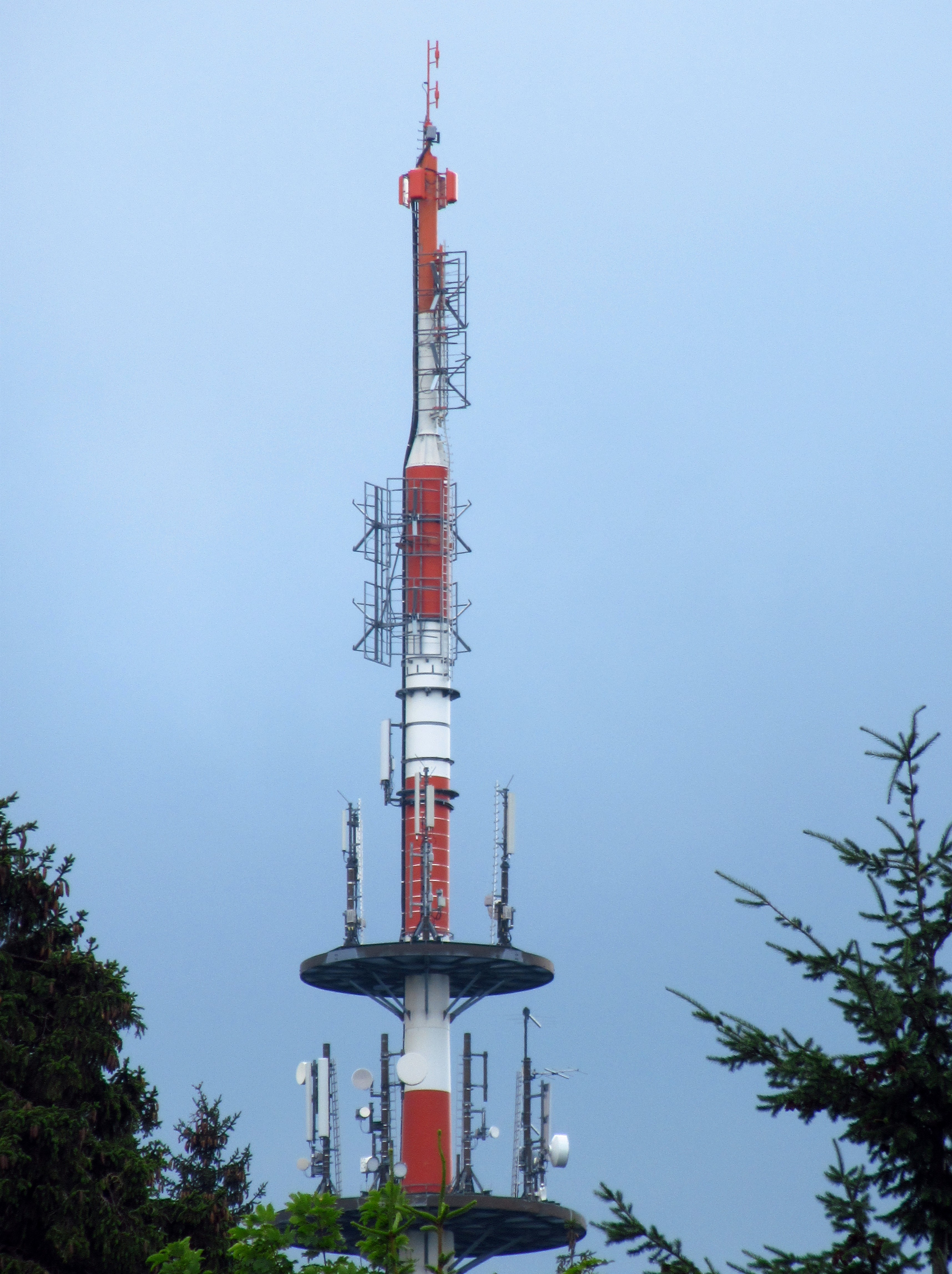 Sender Suhl Erleshügel vom Parkplatz Rimbach aus gesehen.